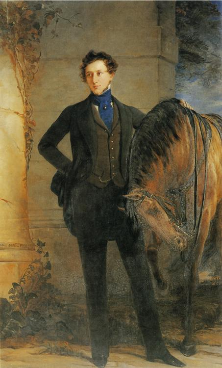 Владимир Петрович Давыдов (1810-1882), впоследствии граф Орлов-Давыдов